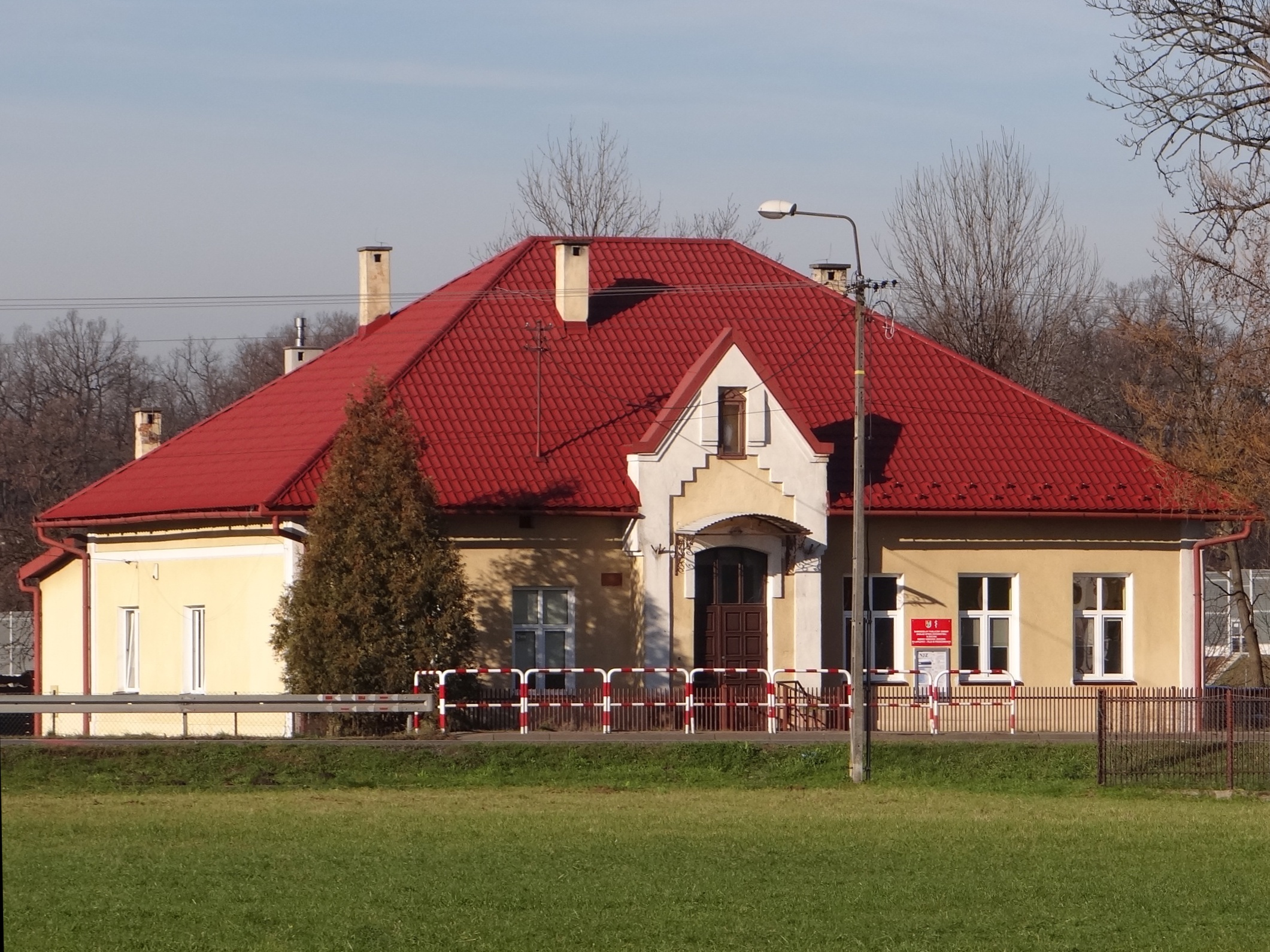 Proszówki. Przychodnia NFZ